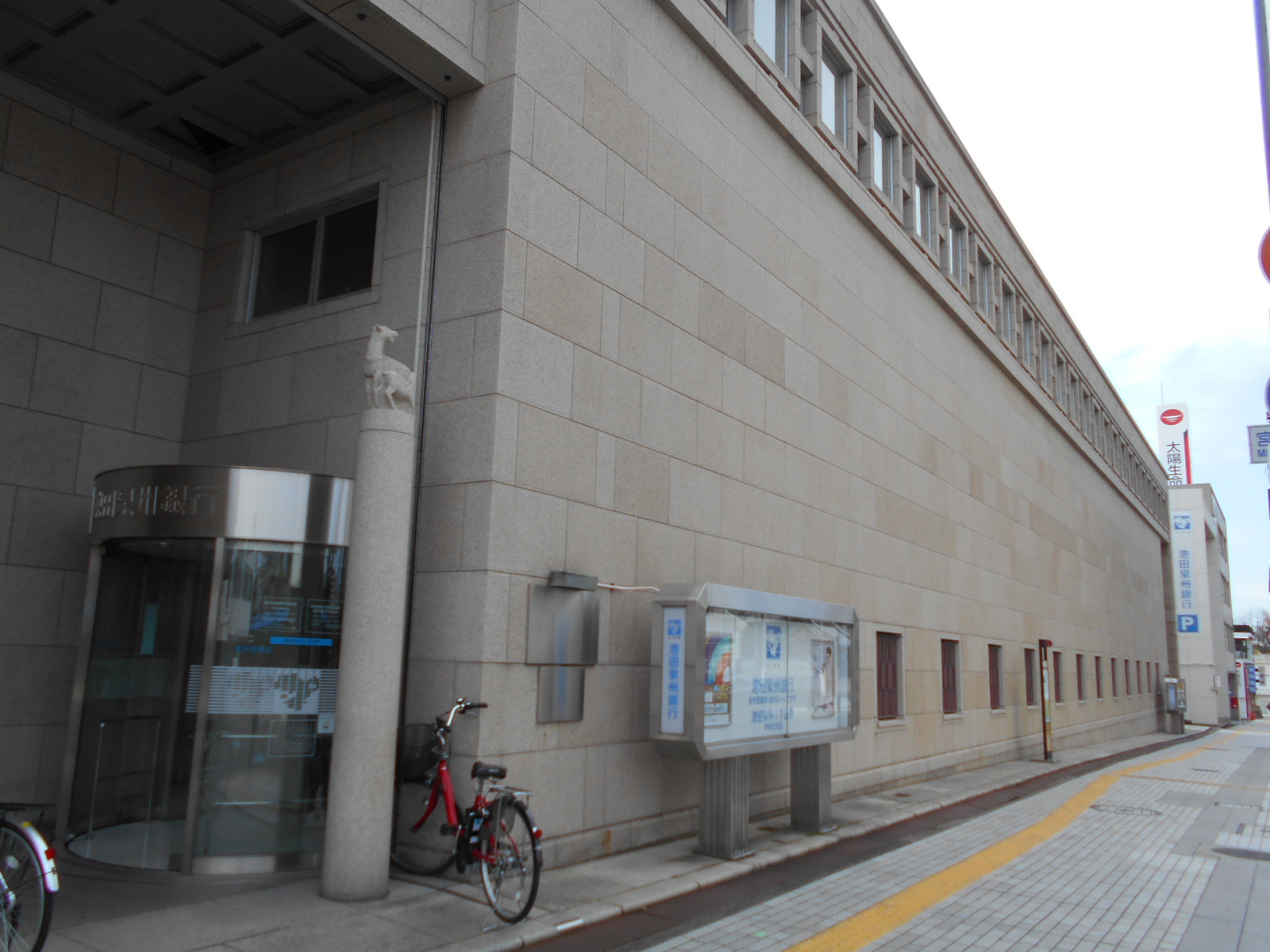 旧泉州銀行本店